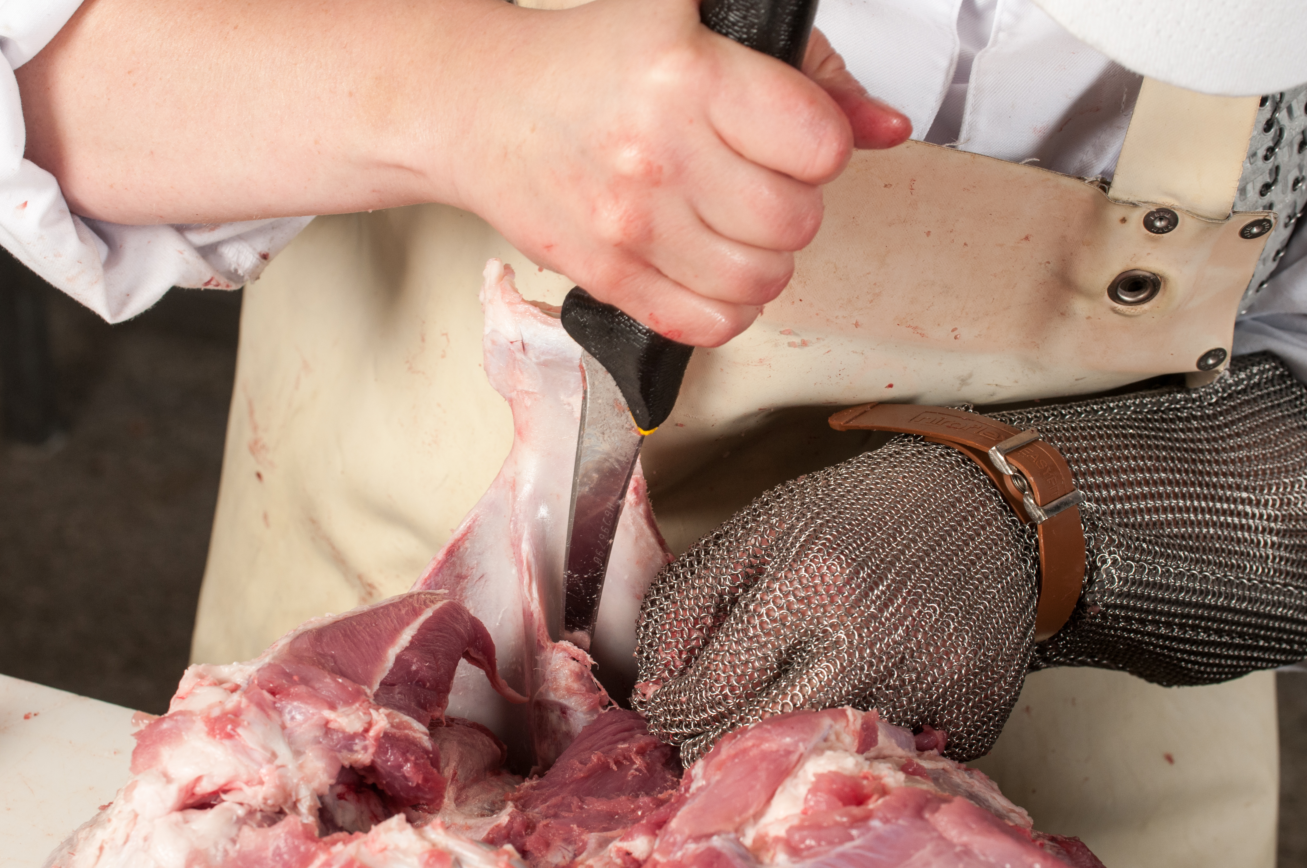 Wiki Loves Mett: Auslösen des Blattknochens aus dem Vorderschinken